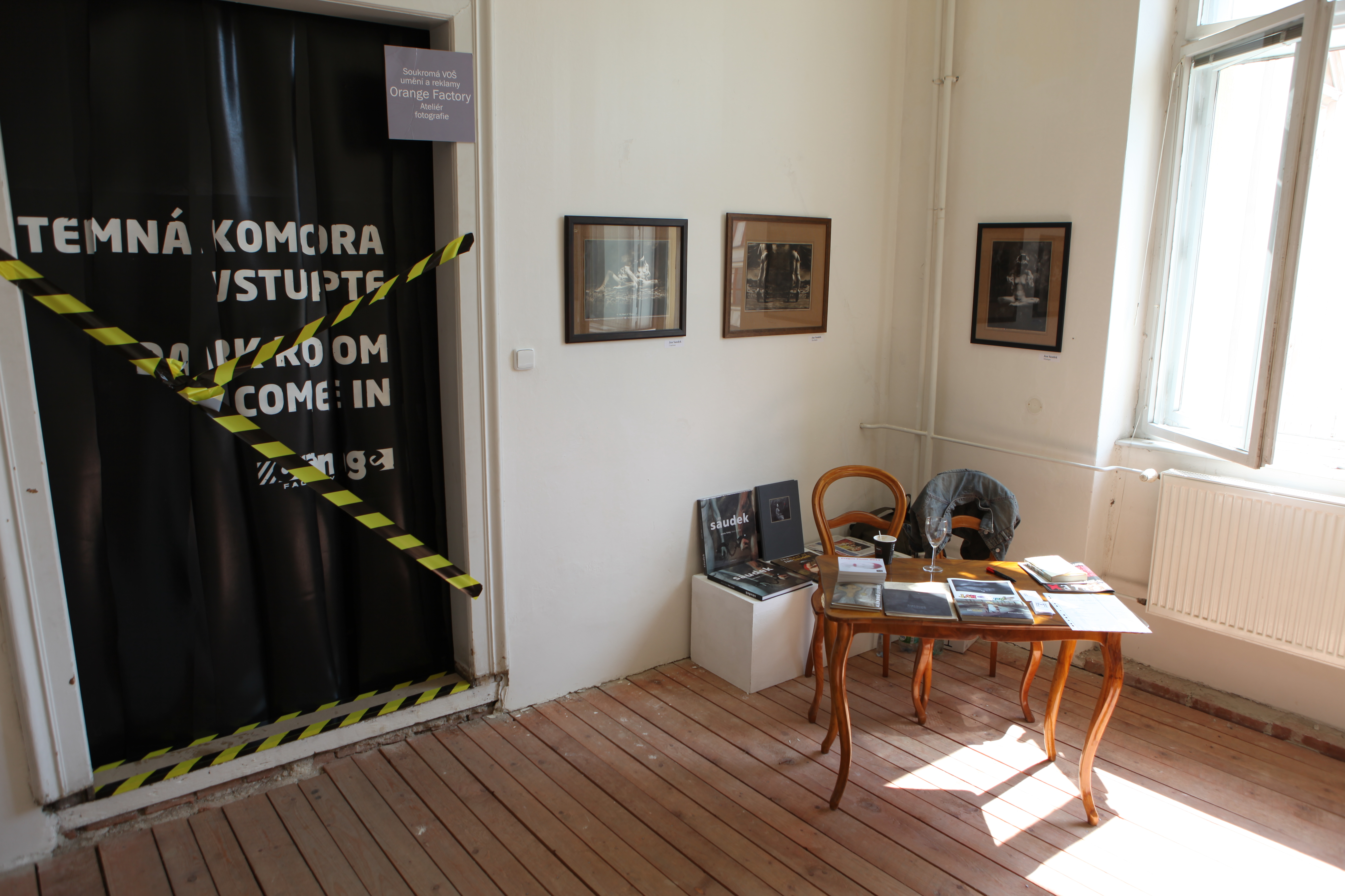 Expozice festivalu Prague Photo 2013, foto: Vít Švajcr Dobré světlo.com.